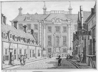 Fundatie huys te Utrecht, 1789 - Gezicht vanuit de Lange Nieuwstraat te Utrecht op de voorgevel van de Fundatie van de Vrijvrouwe van Renswoude, met links de voorgevels van de Beyerskameren. Huis van Laurens Praalder